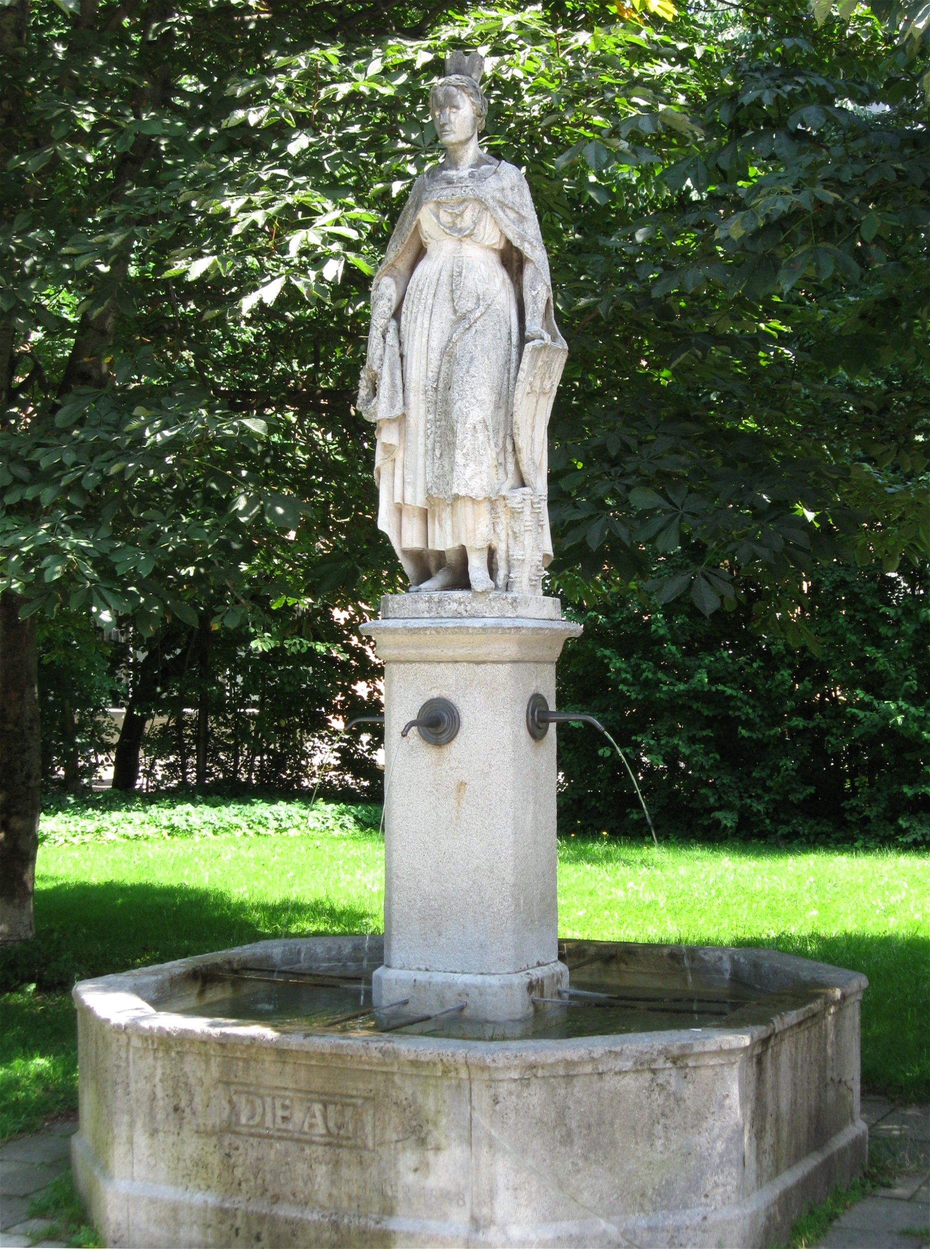 Auia-Brunnen, München-Au, Ludwig Schwanthaler, 1848